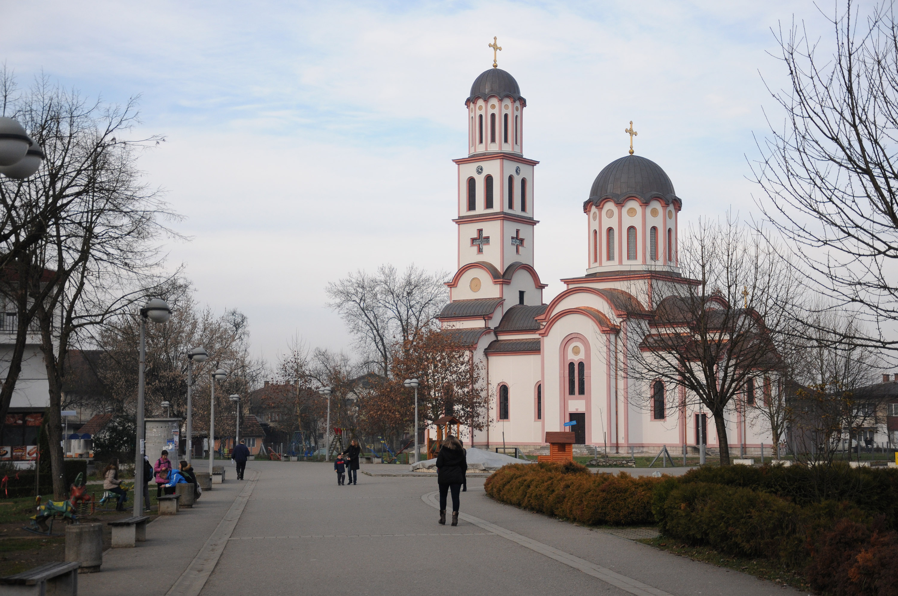 Srbac crkva bogorodicnog pokrova This image was uploaded as part of Trace of Soul 2015.